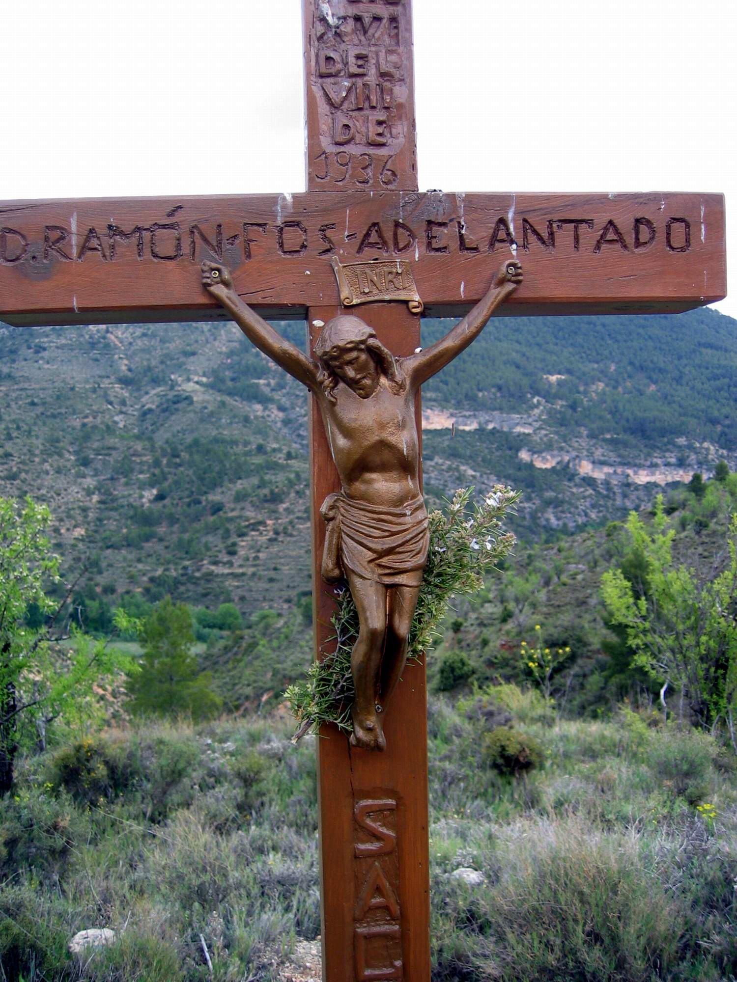 Cruz en la partida de Los Aljezares de Casasbajas (Valencia), en homenaje a don Ramón Fos Adelantado, sacerdote asesinado en 1936.